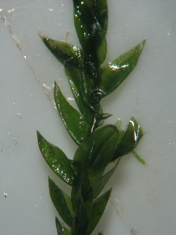 Quellmoos Fontinalis antipyretica, Müritz-Gebiet